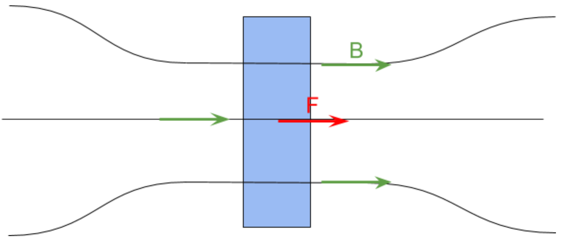 B : le champ magnétique en Tesla